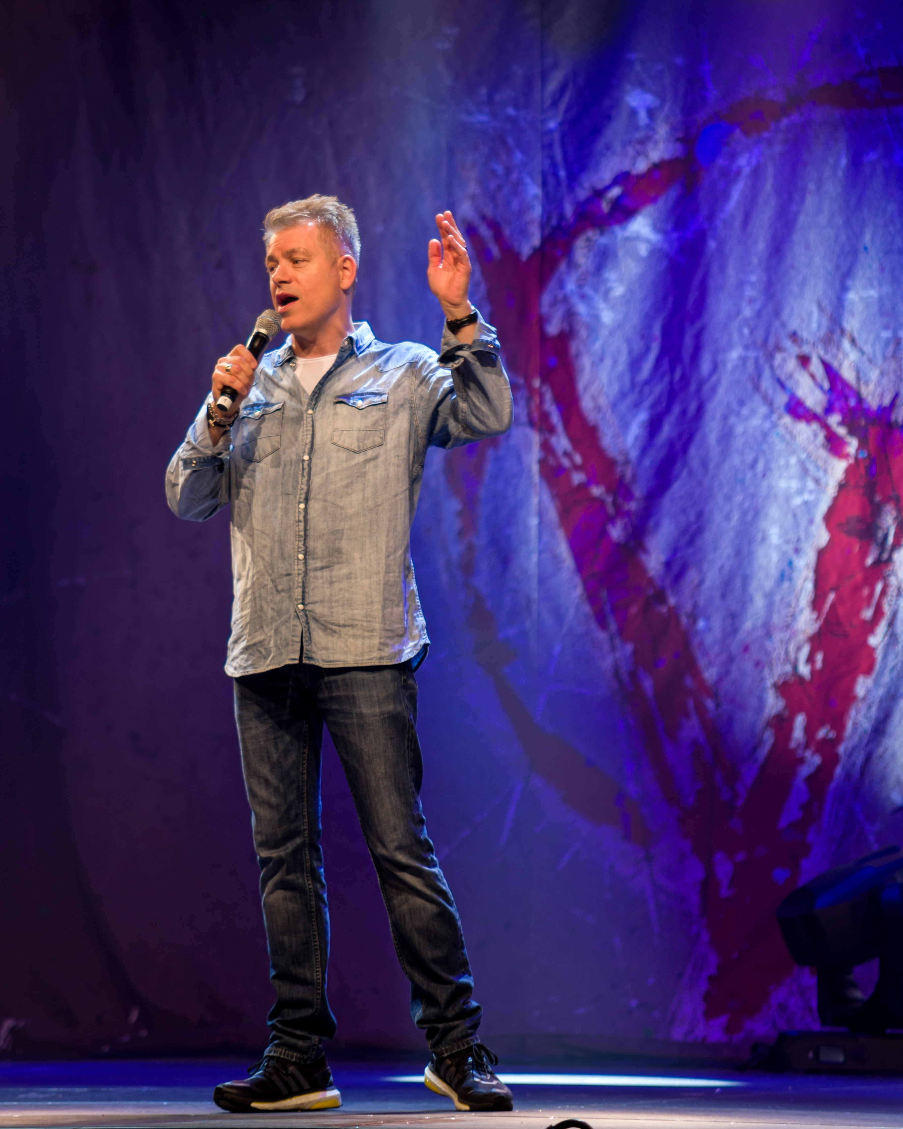 Bilder vom Zelt Musik Festival 2017 in Freiburg im Breisgau Michael Mittermeier "Wild" (ZMF 2017)